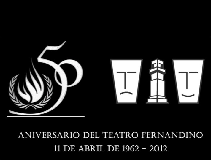 Logo del CLub de teatro fernandino 50 aniversario